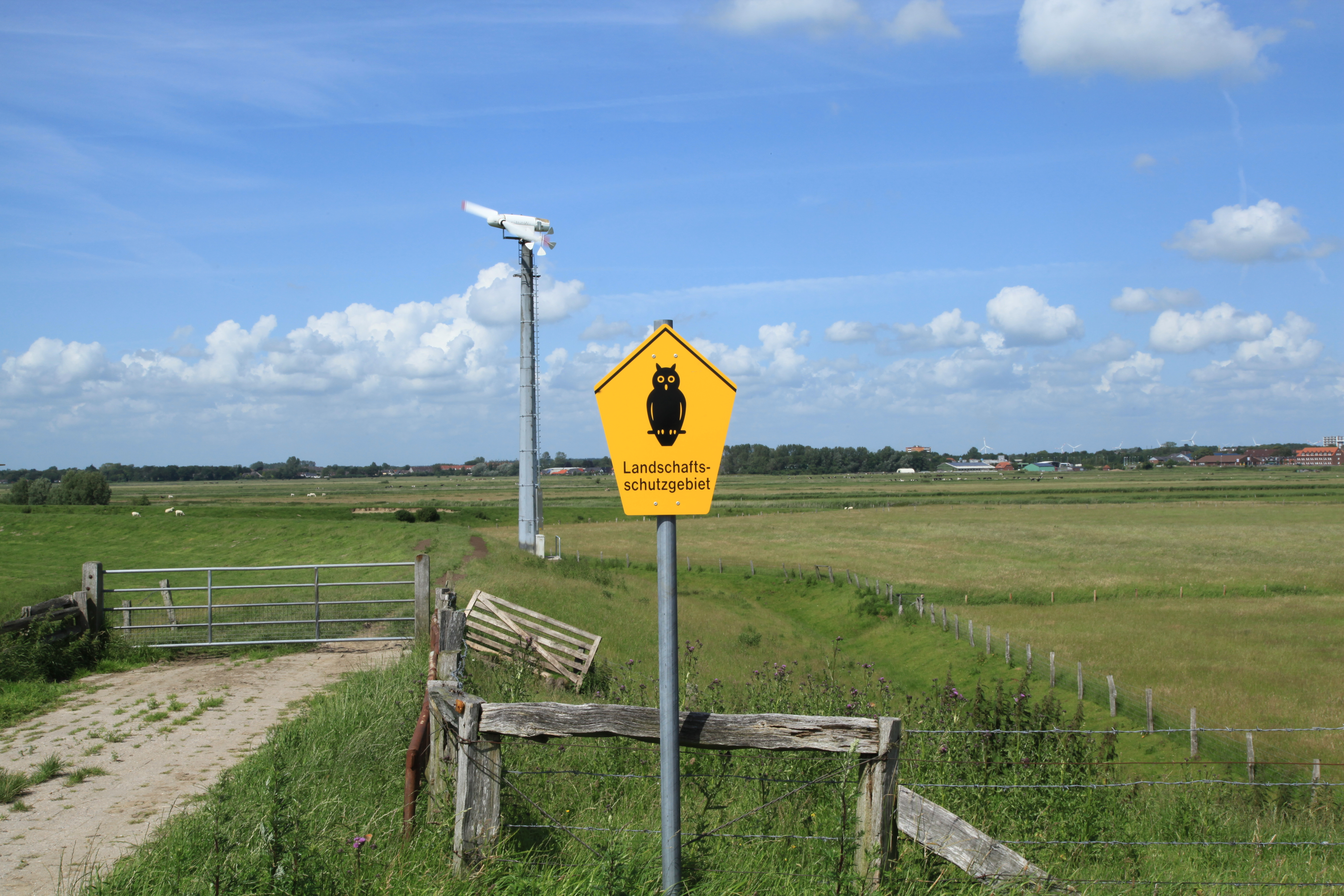 Dockkoogstraße in Husum, LSG „Dockkoog und Porrenkoog“